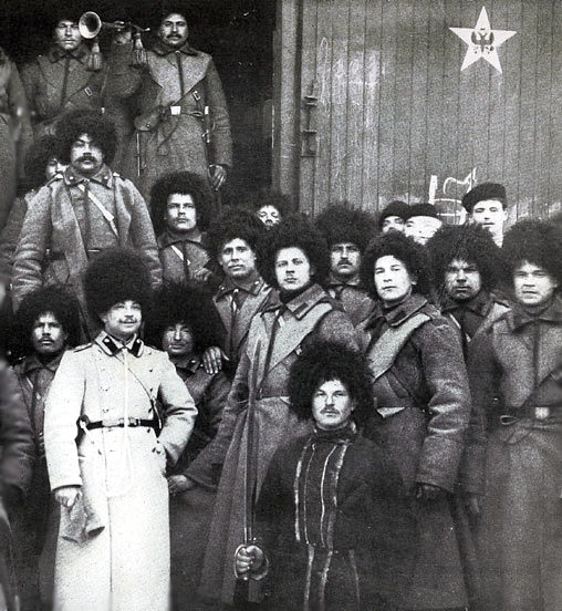 Уникальная фотография (фрагмент): Из Гатчины на японский фронт (Русско-японская война) в Маньчжурию отправляется 23-я артиллерийская бригада. Зима 1904 года. По просьбе фотокорреспондента канониры выстроились для парадного снимка. Любопытная деталь: на двери вагона изображена пятиконечная звезда с двуглавым имперским орлом в центре.